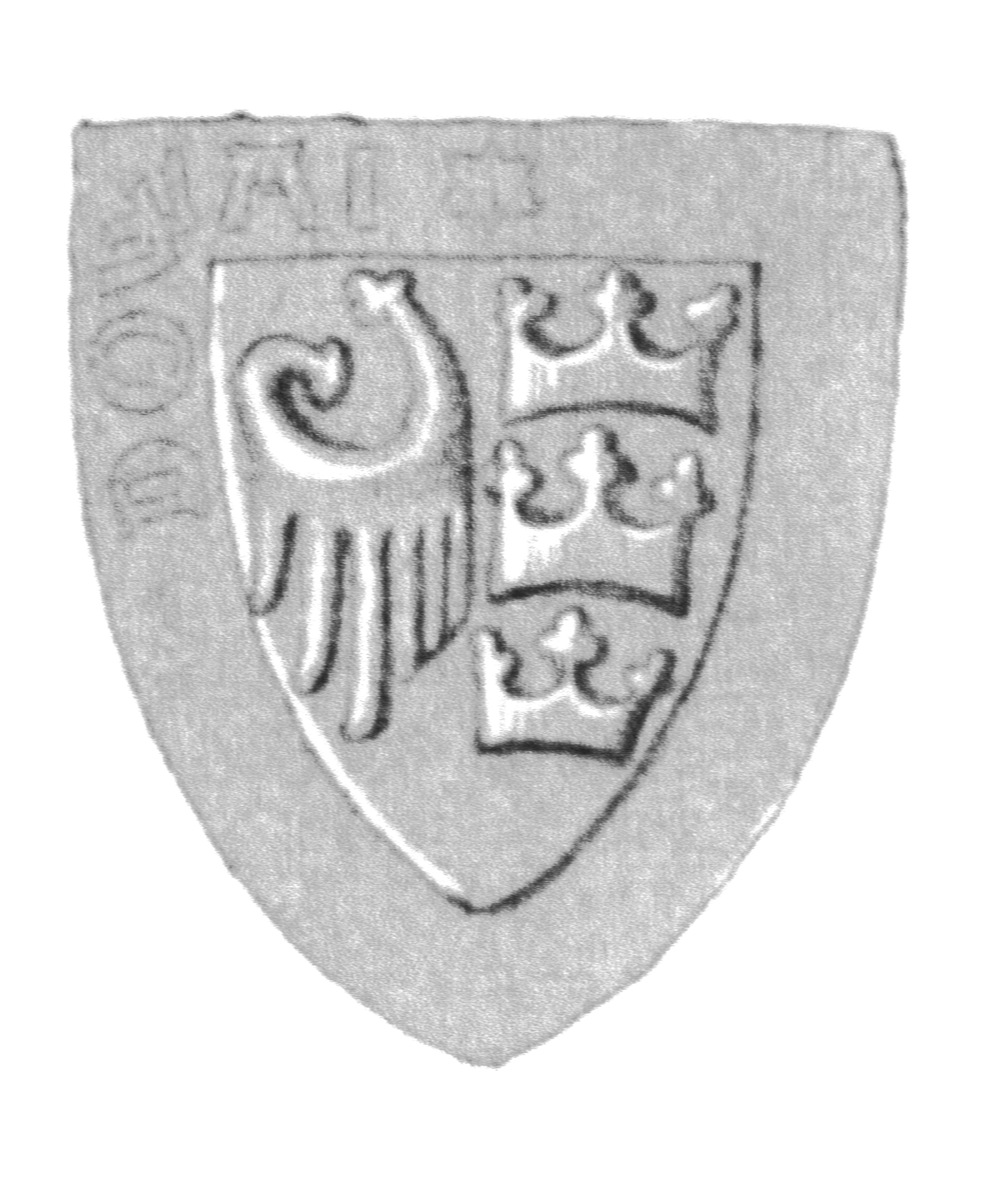 Siegel des Ratsmannes Johannes dictus de Douaie. Das Siegel stammt aus der Zeit um 1287. Siehe Emil Ferdinand Fehling: Lübeckische Ratslinie, Nr. 236 (Johann von Doway).